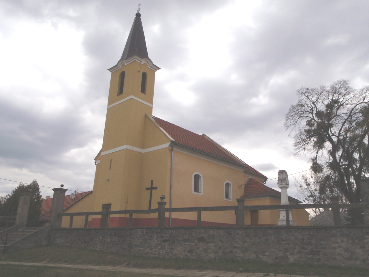 Doba, Szent Péter és Pál-templom, gótikus, 14. sz. Átalakítva barokk stílusban 1779-ben